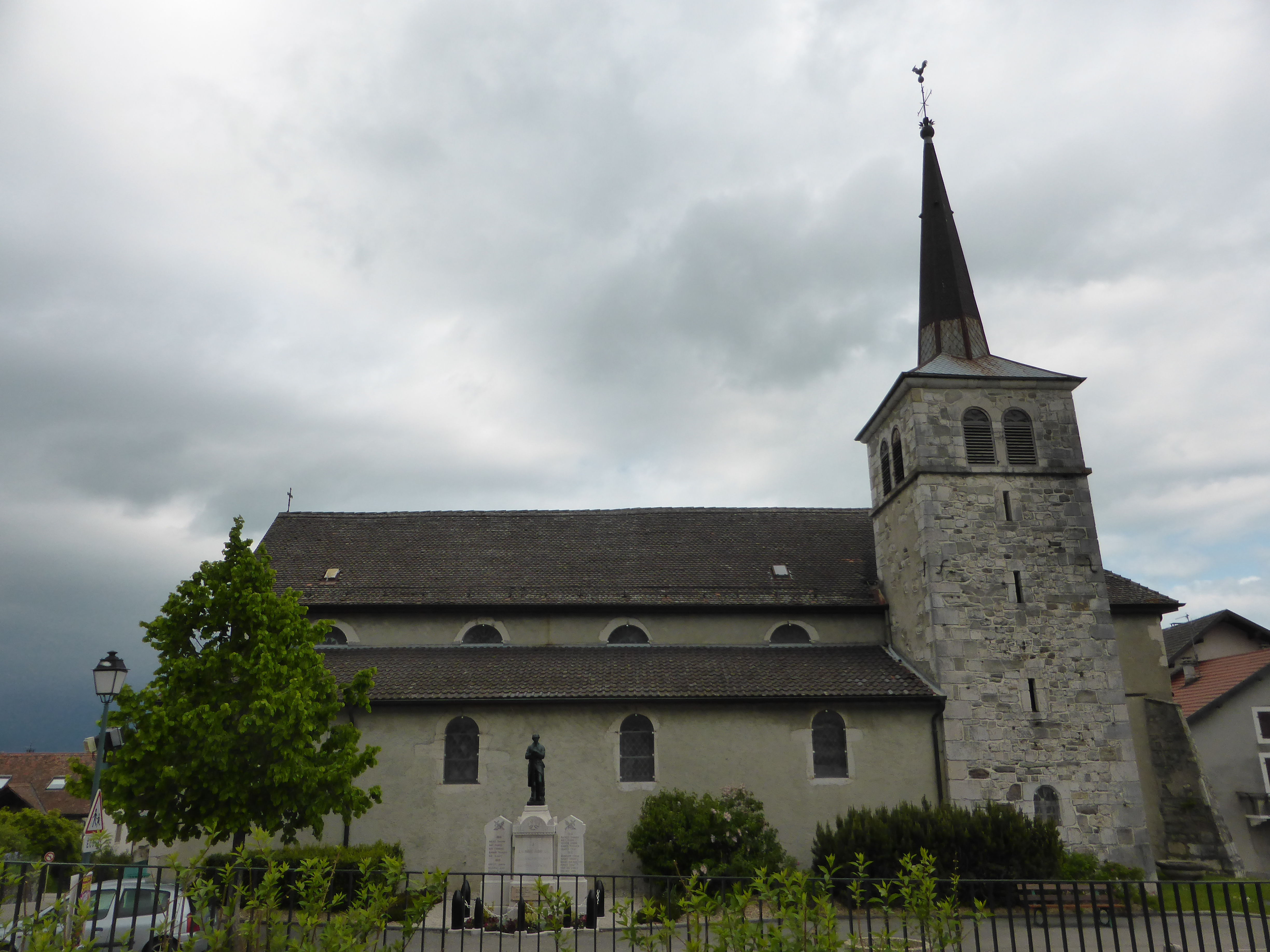 Église Saint-Maurice de Vulbens, en Haute-Savoie.